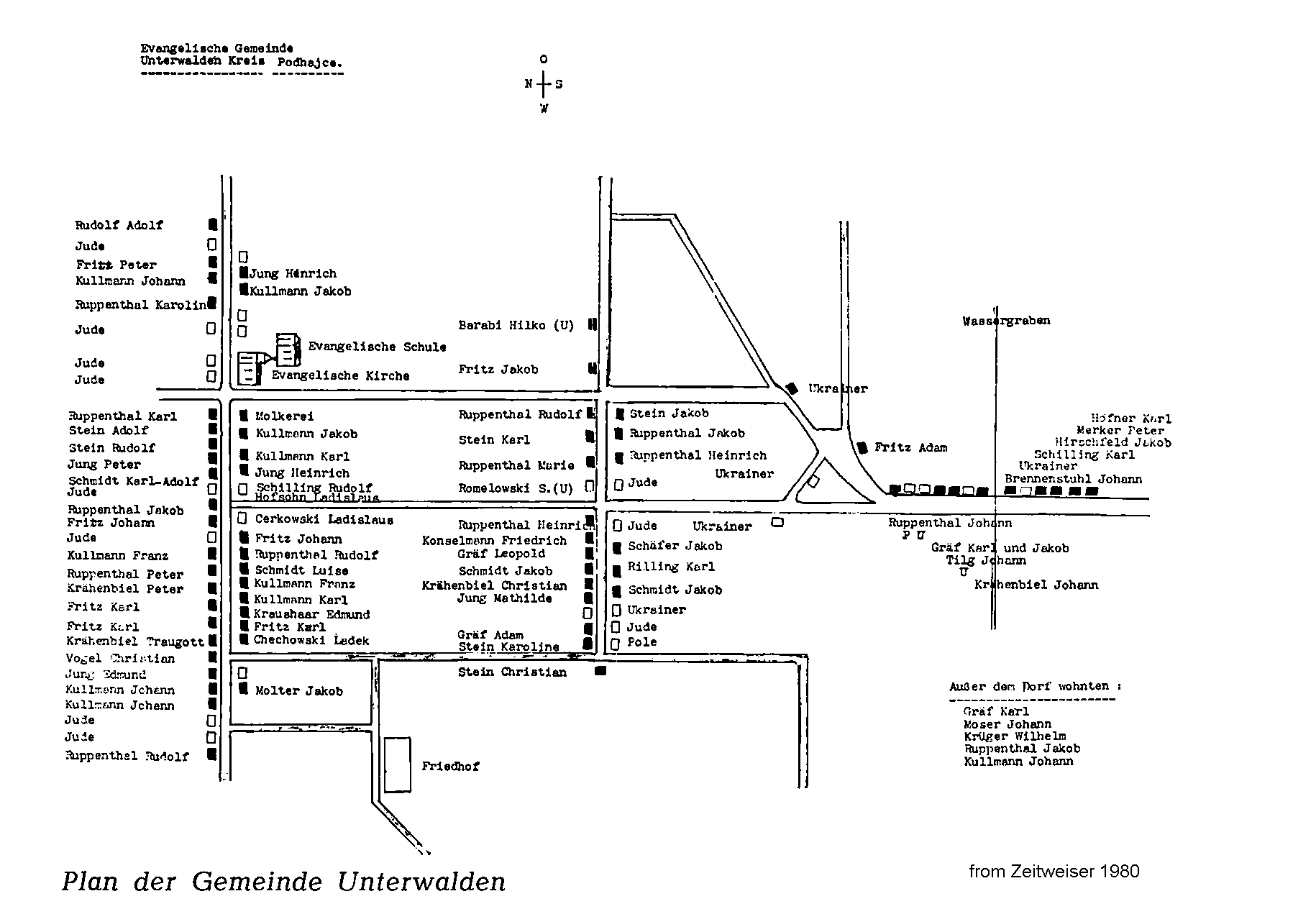 План поселення німецької колонії Унтервальден